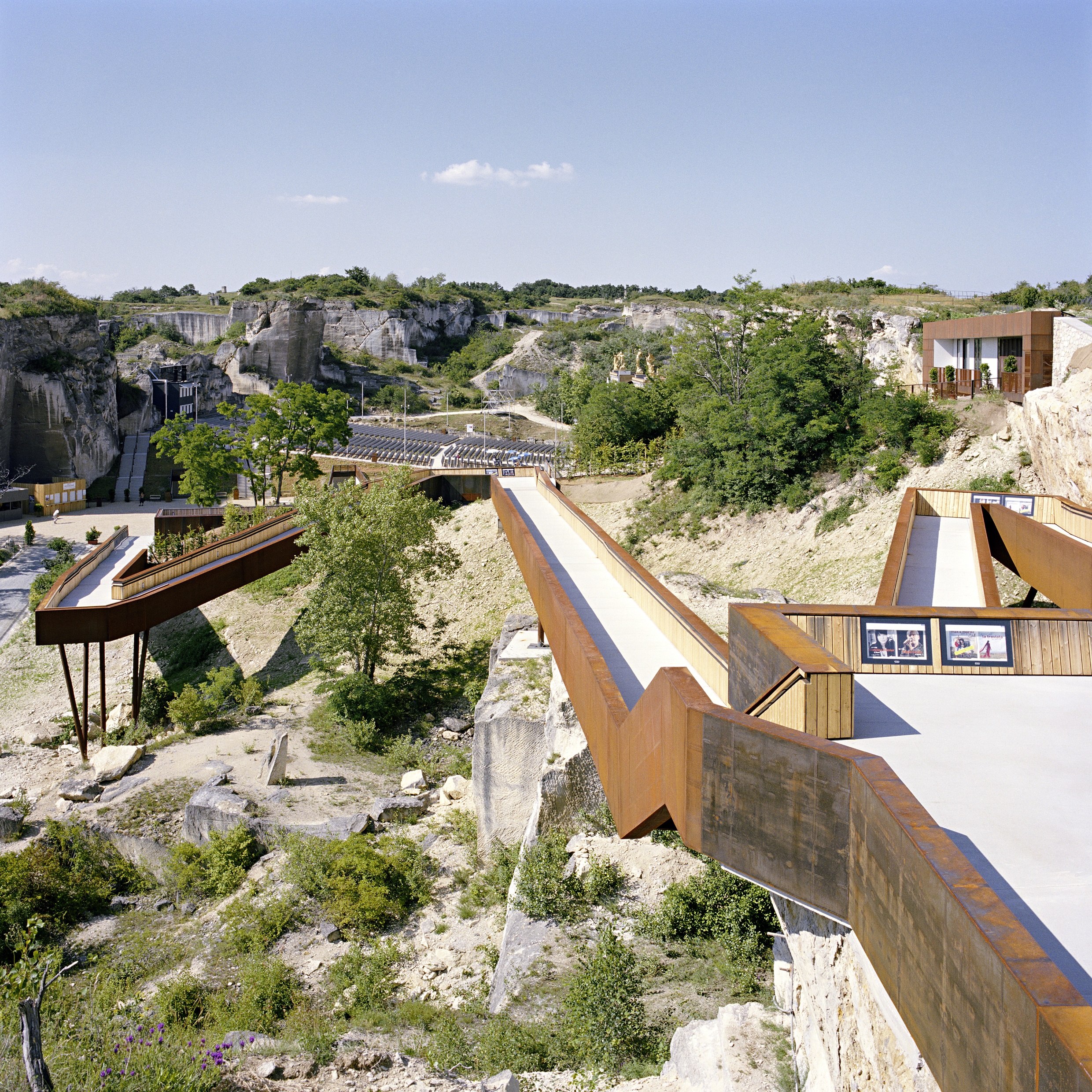 Der Abgang in den bizzaren Römersteinbruch St. Margarethen